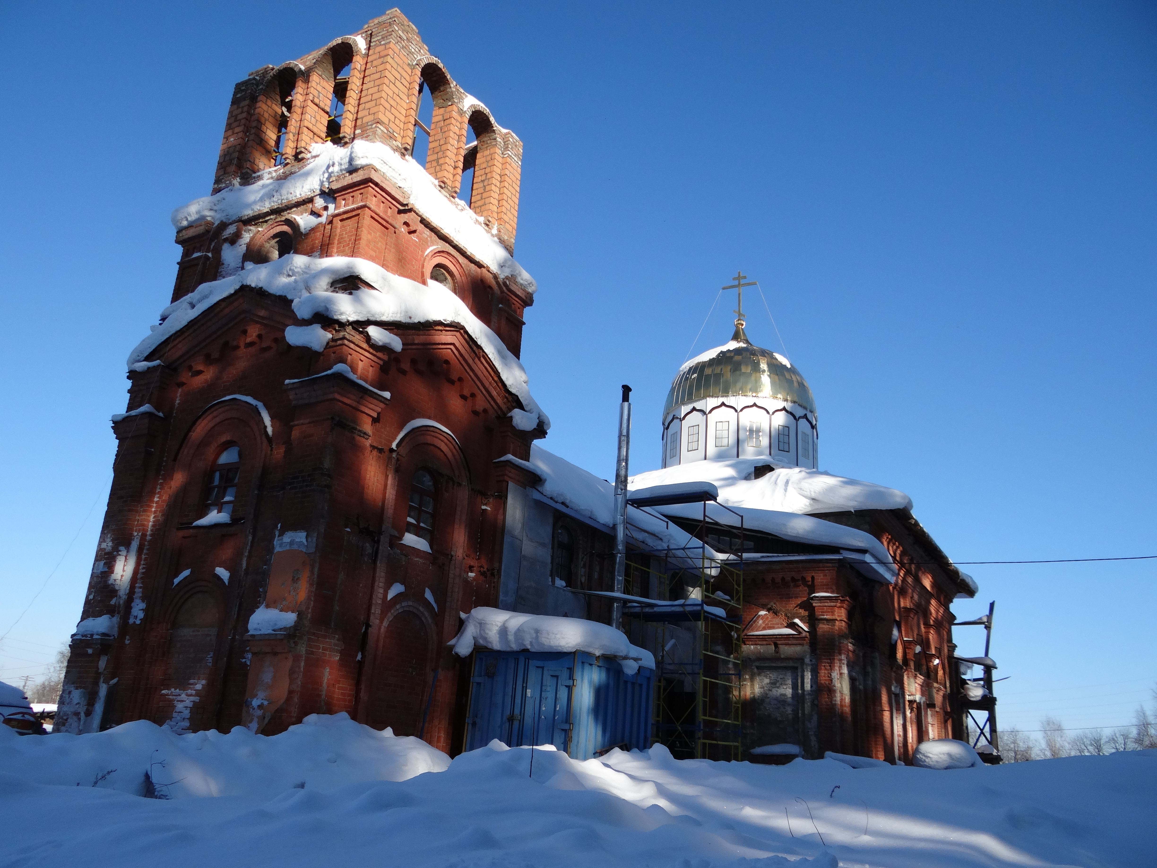 Церковь Александра Невского и колокольня. Комплекс (Республика Карелия, Пудож, Пионерская улица)